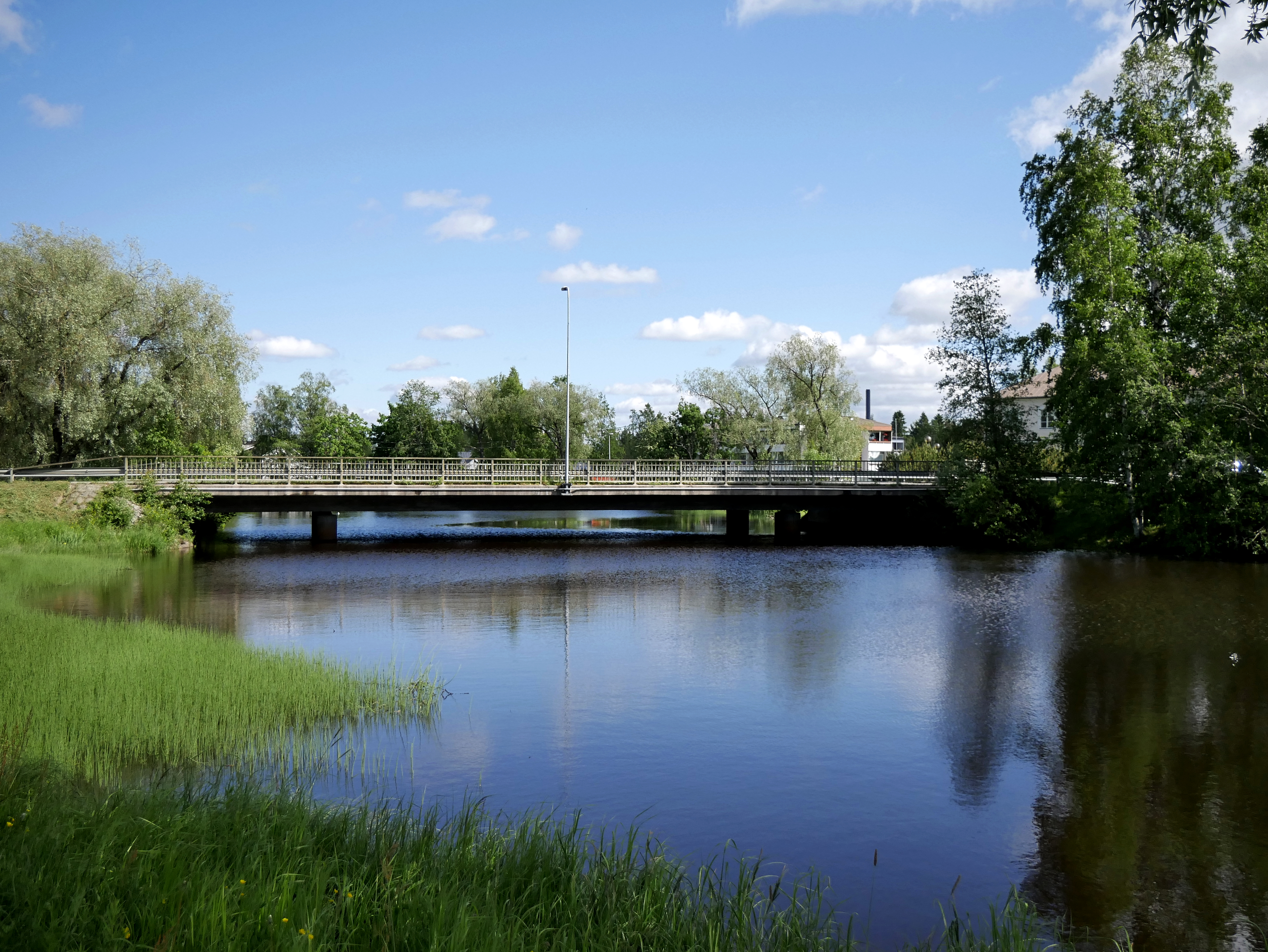 Kruunupyynjoki Kruunupyyn keskustassa.